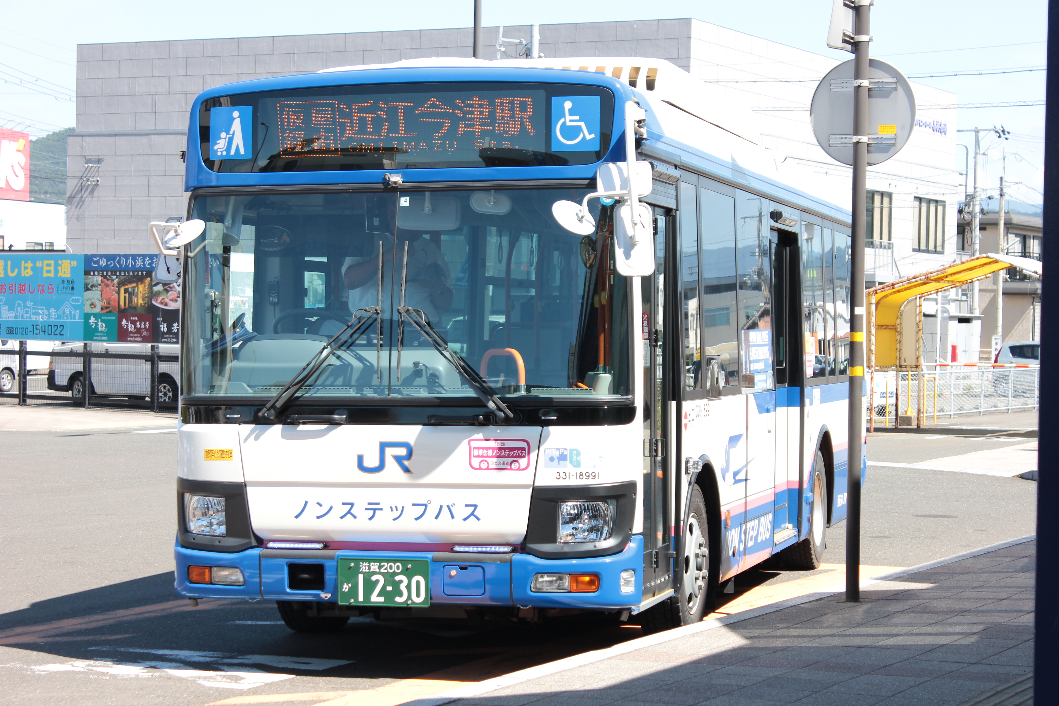 小浜駅前に停車中の西日本ジェイアールバス「若江線」のバス。近江今津駅行き。 Canon EOS Kiss X5